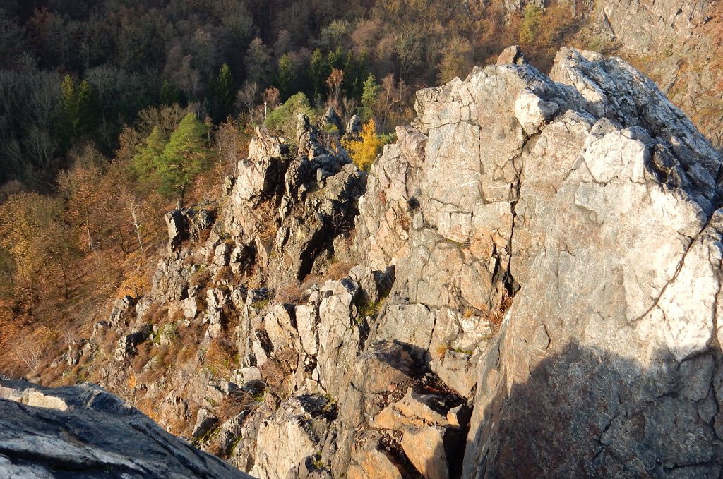 Horní partie skalního severozápadního hřebene na Dívčí skok